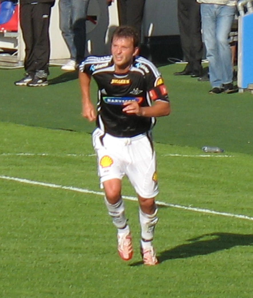 Fotballspilleren Roar Strand